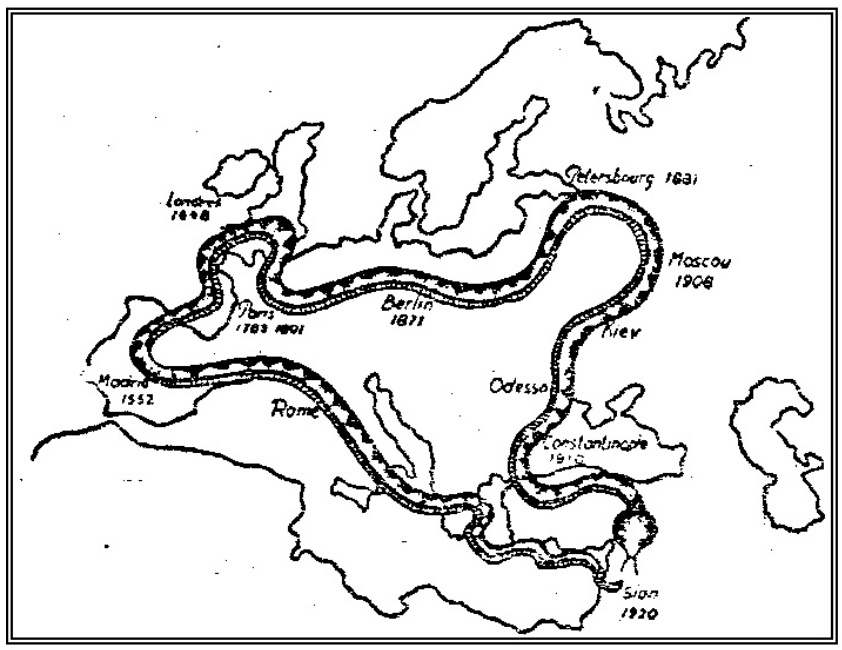 Reproduction du serpent symbolique de la conspiration de Sion, illustration d'une édition française des Protocoles des Sages de Sion. environ 1920.